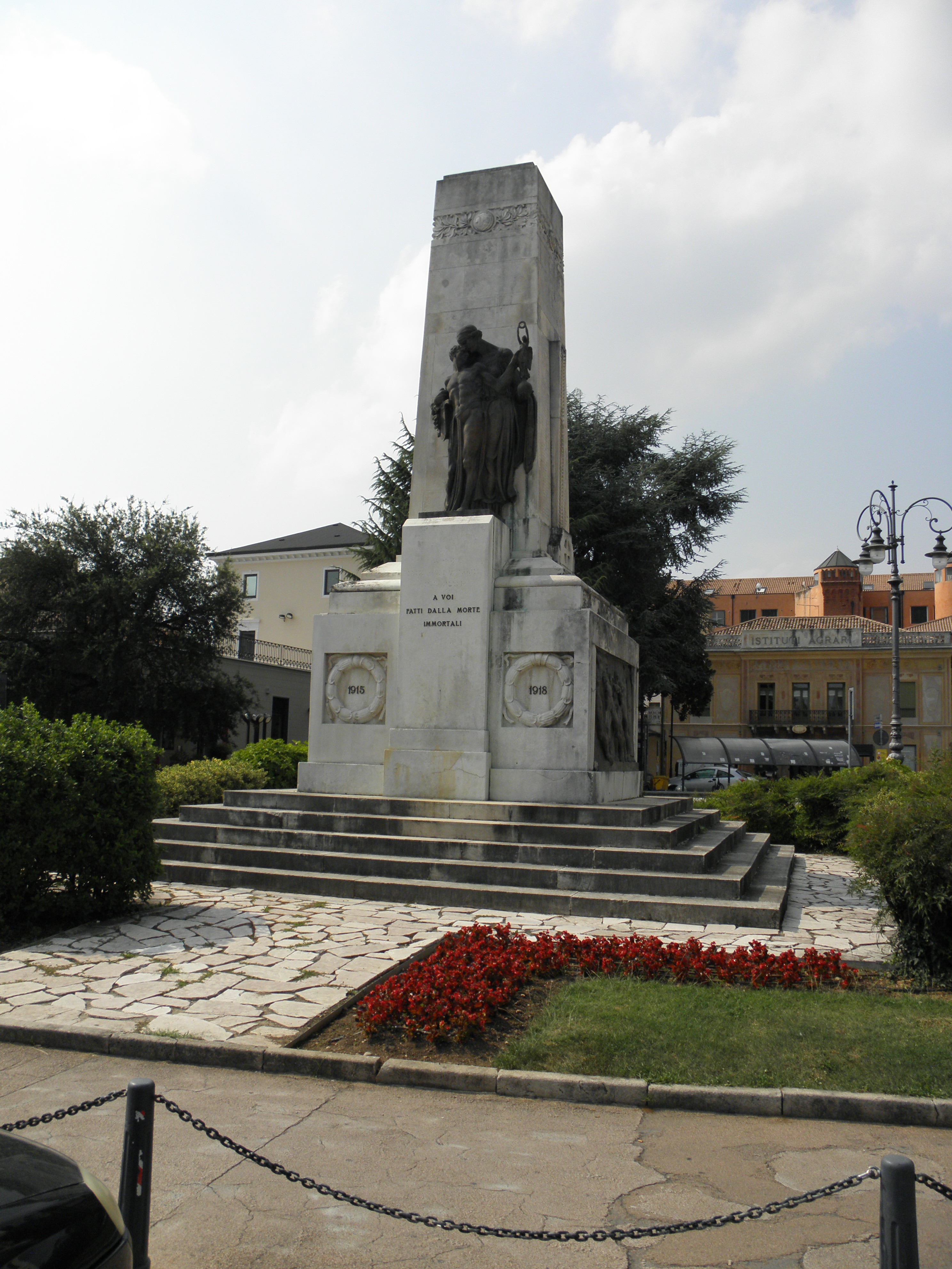 Montebelluna: il monumento dedicato ai concittadini caduti.